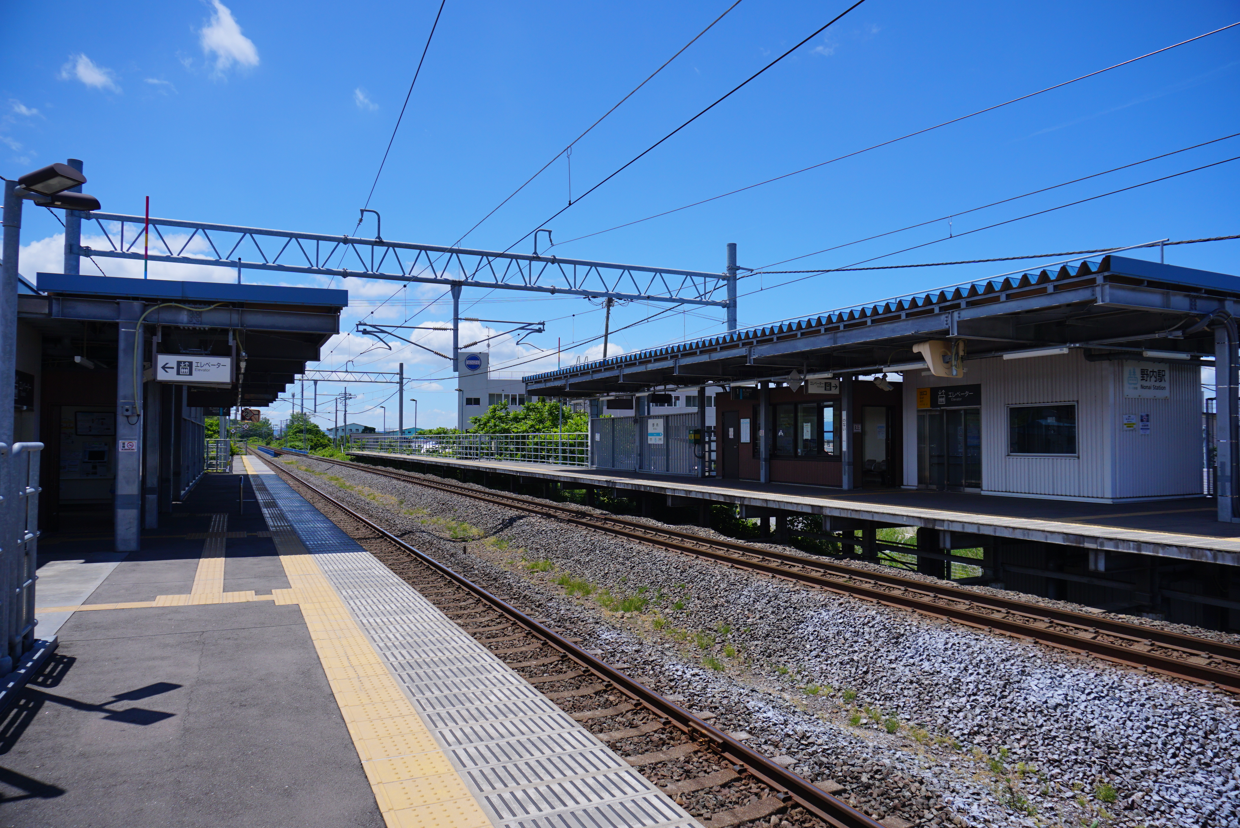 青い森鉄道 野内駅（青森県青森市）。東北新幹線盛岡以北の延伸開業に伴いかつての東北本線が第三セクターに移管された青い森鉄道線であるが、野内駅は青い森鉄道によって旧駅から移設され、実質的には新たに建設された駅である。